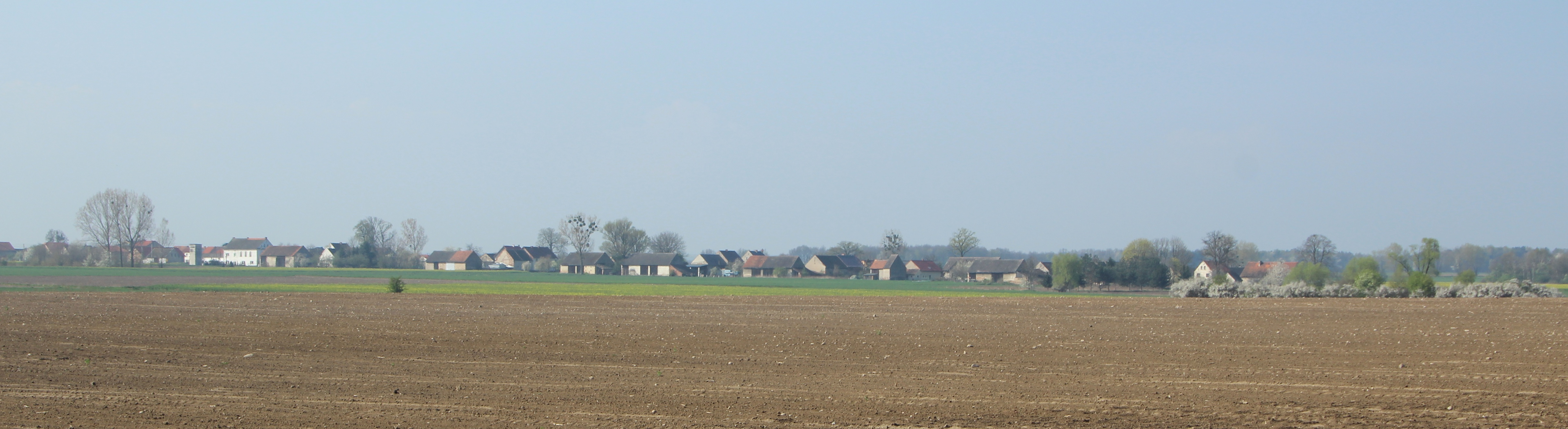 Kuropas – wieś w Polsce położona w województwie opolskim, w powiecie nyskim, w gminie Korfantów.